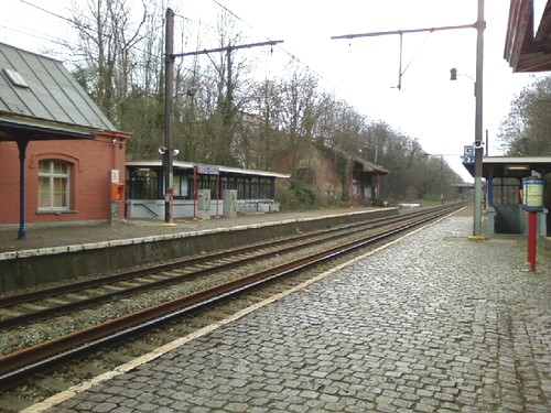 Gare d'Uccle Stalle Bruxelles Belgium